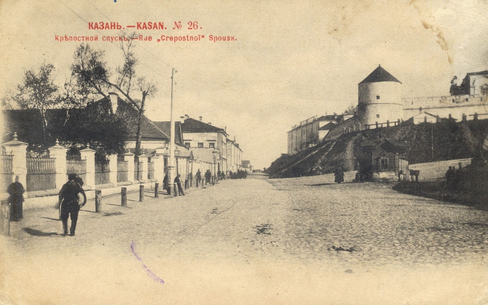 "Крепостной спуск" и Юго-Западная башня Казанского Кремля (г. Казань, около 1902 г.).